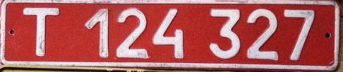 Дипломатический автомобильный номер СССР образца 1980 года, техперсонал